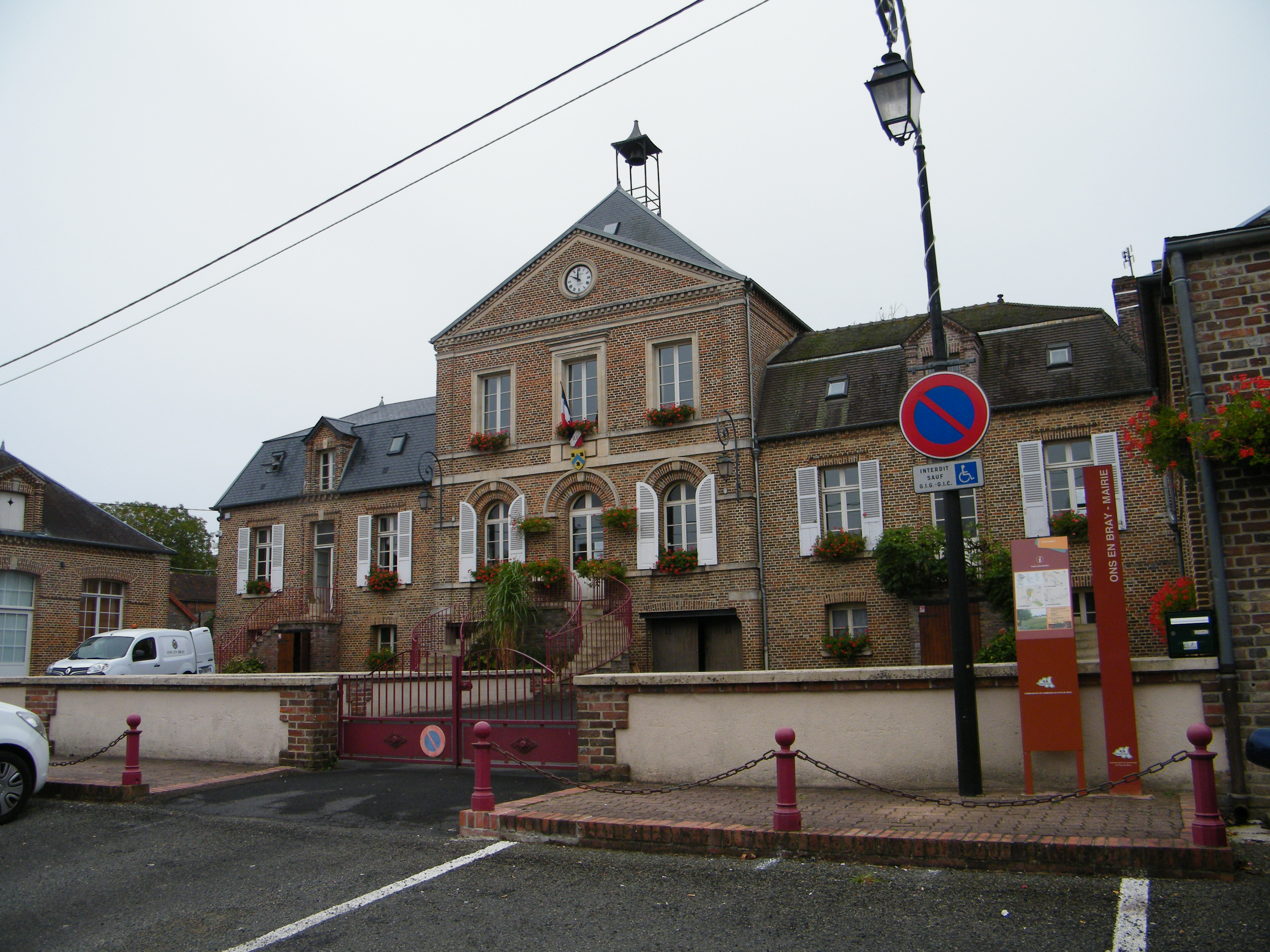 Ons-en-Bray, Oise, Fr, mairie